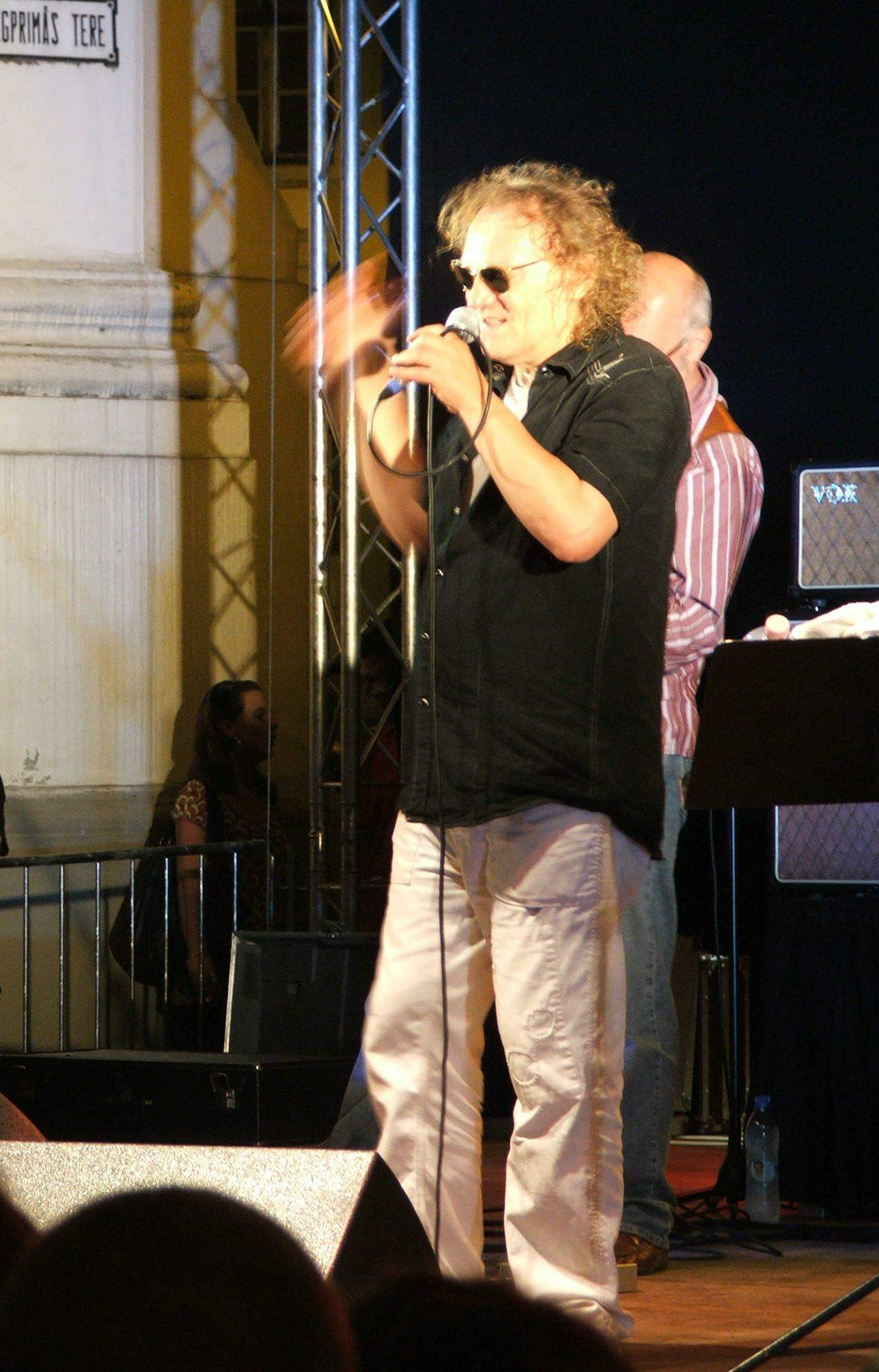 Charlie a 2008-as Jazztergomon